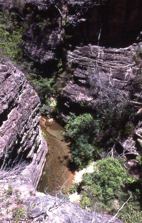 mountains, australia